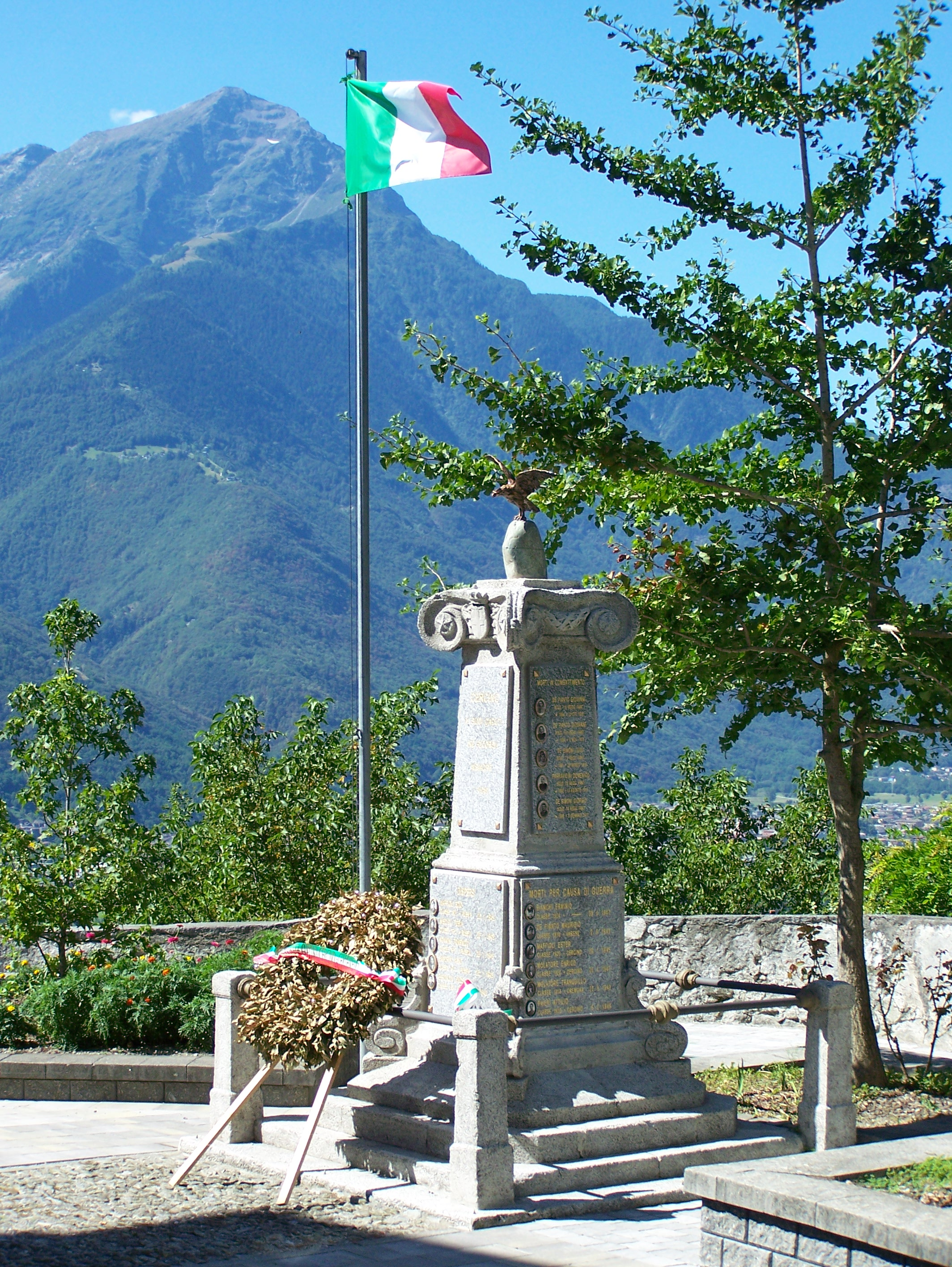 Monumento ai caduti di Cercino (SO) - Italy